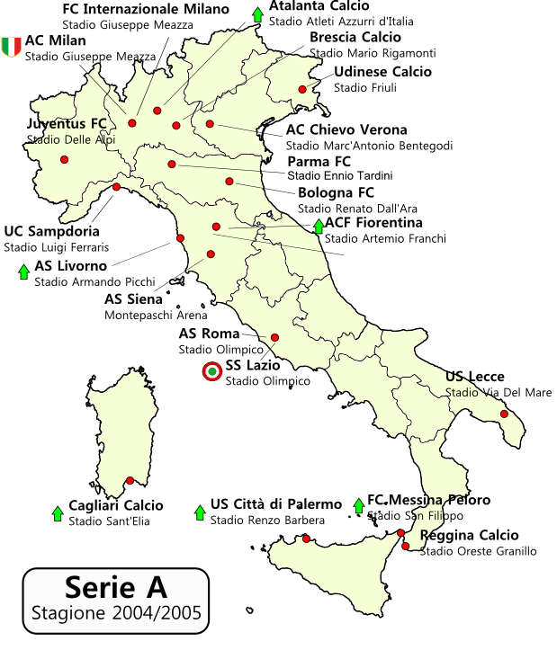 Distribuzione geografica squadre Serie A 2004-2005